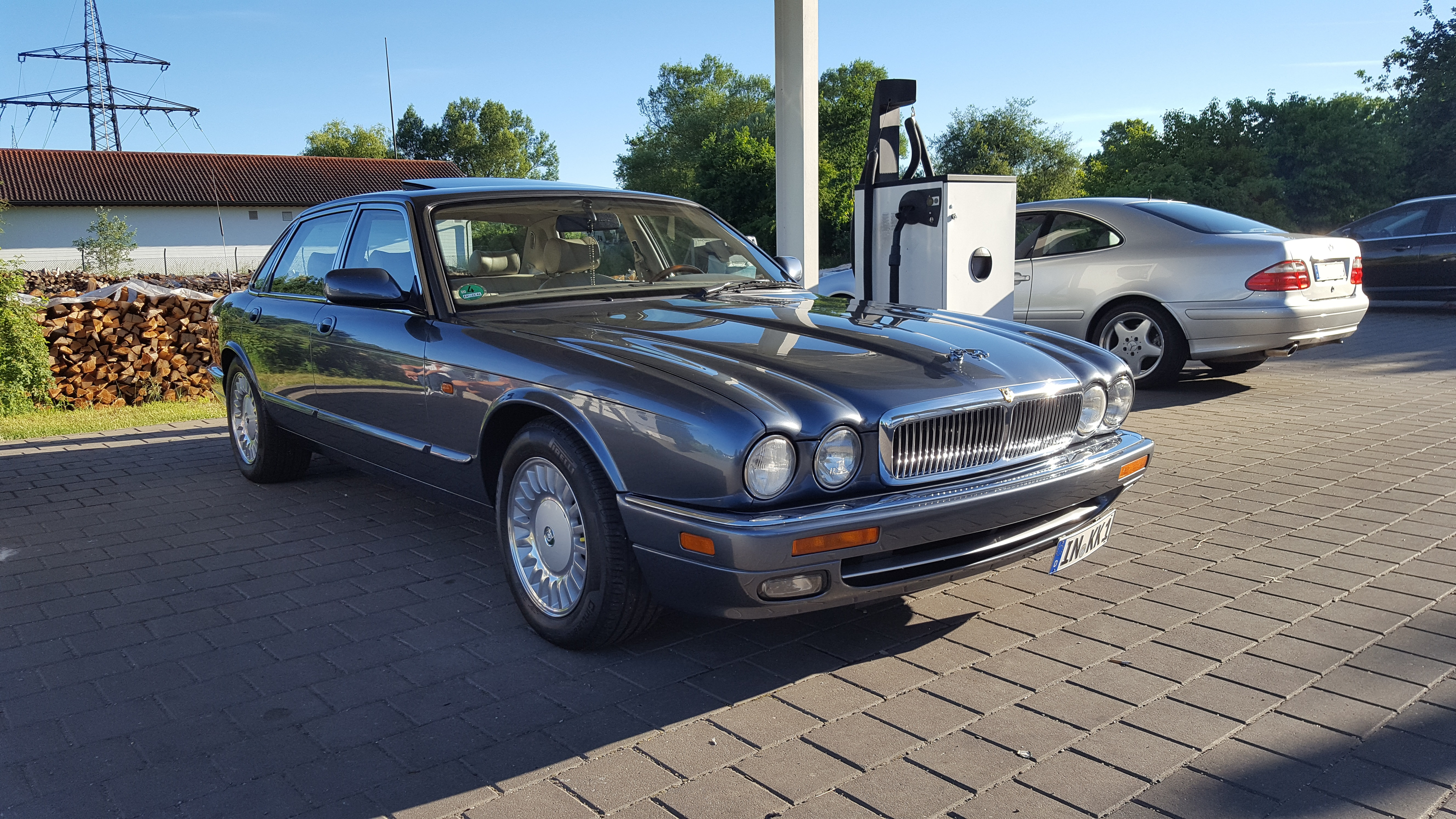 Frontansicht